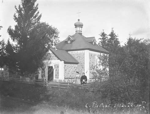 Беларуская (тарашкевіца): Рабунь (Rabuń). Царква